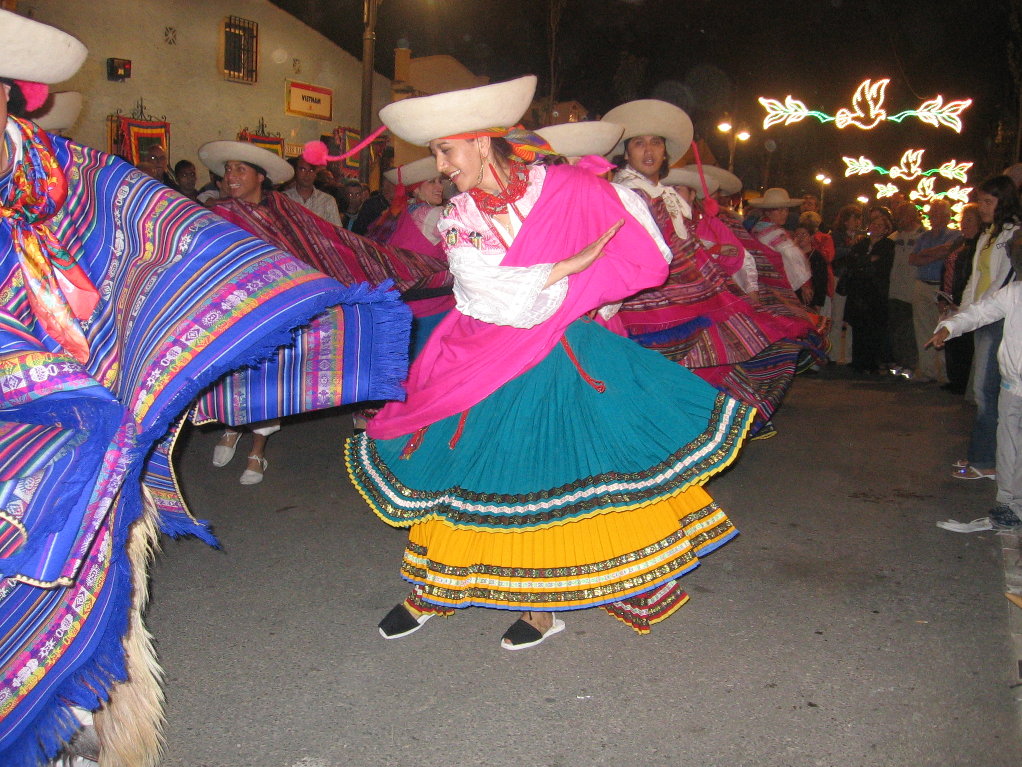 Grupo de Ecuador en la edición de 2006 de la Feria Internacional de los Pueblos de Fuengirola, Málaga, España.